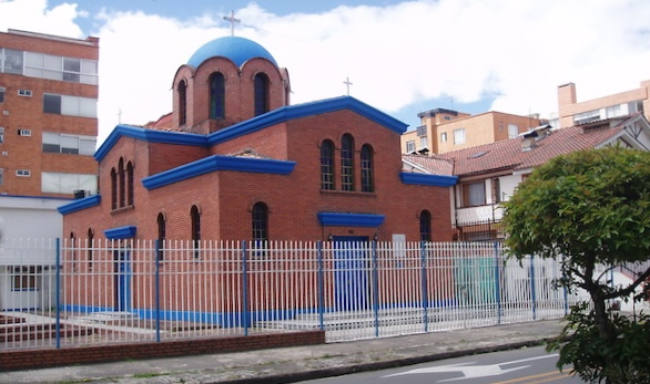 La iglesia ortodoxa griega cerca de pereira